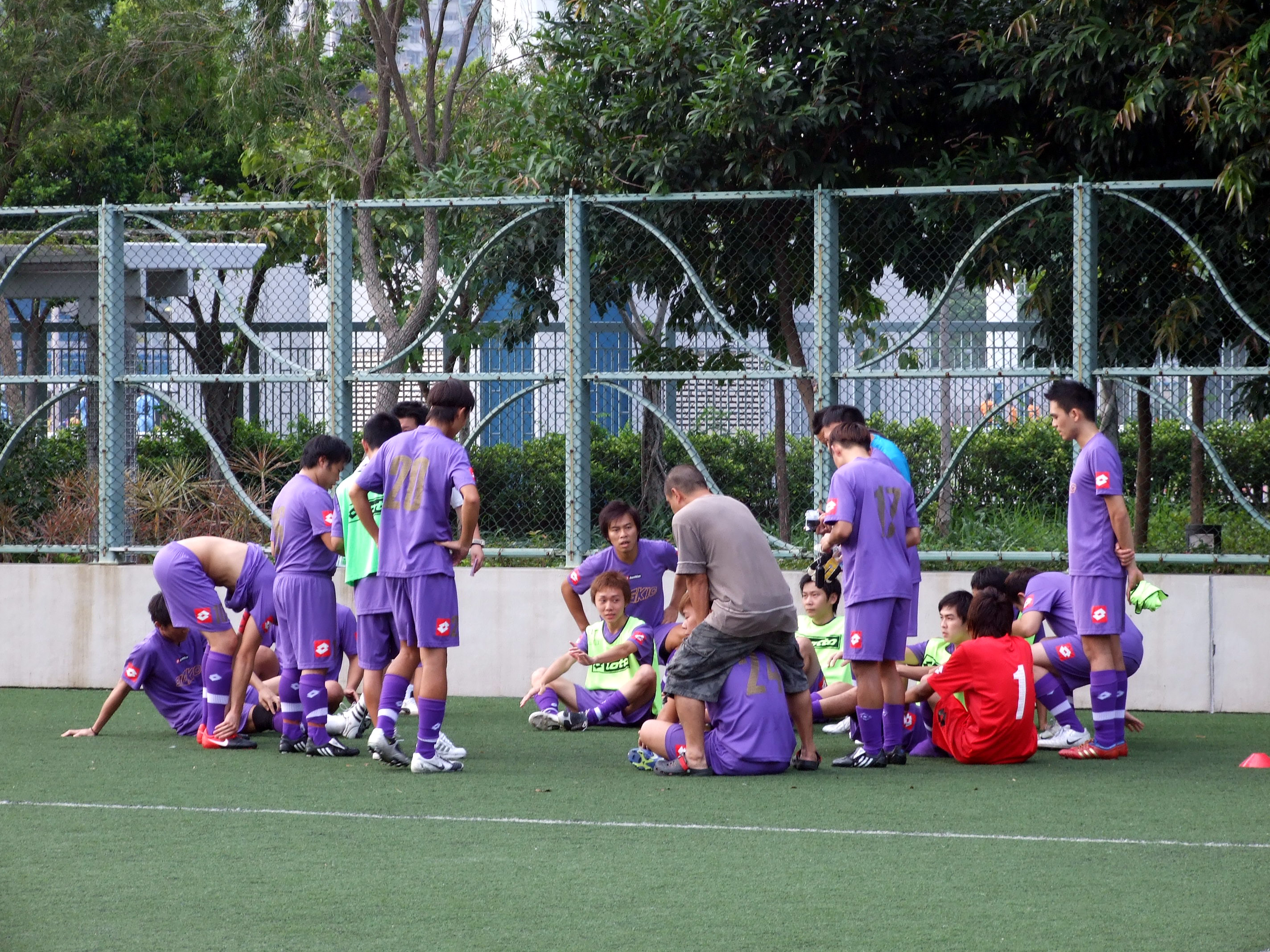 中文（香港）: 五一七賽前準備